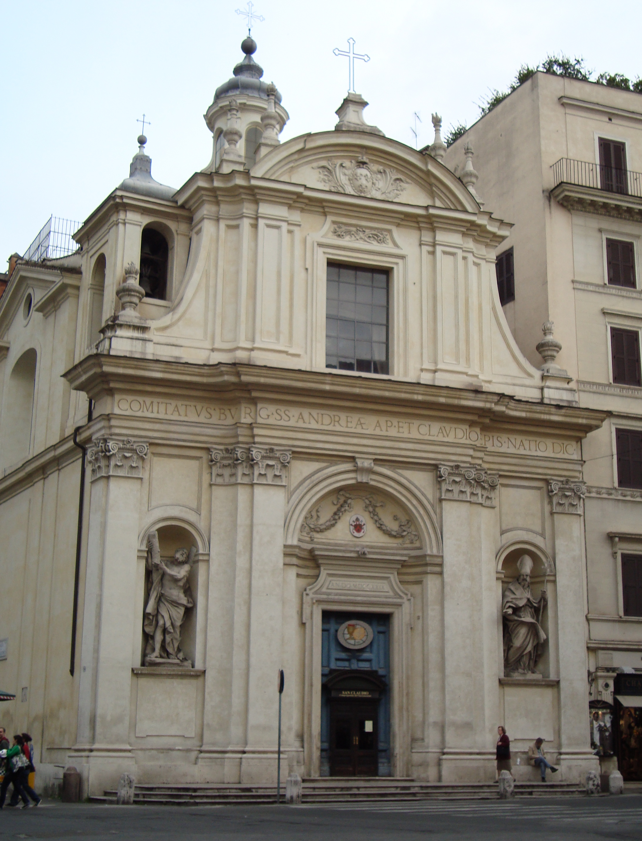 Église Santi Claudio e Andrea dei Borgognoni sur la piazza San Claudio de Rome